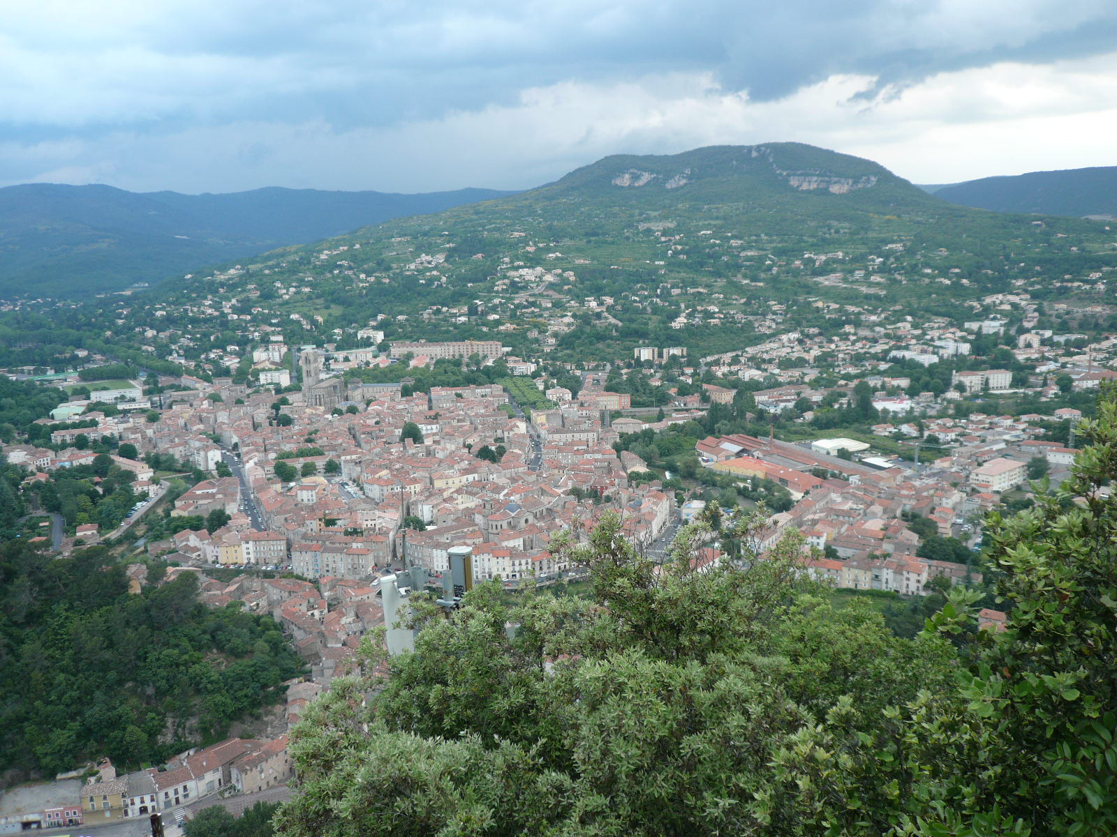 Vue d'ensemble de la ville de Lodève - Hérault